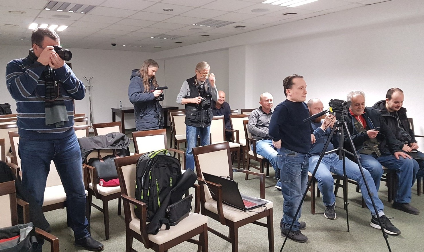 Konferencja prasowa, 18.01.2019